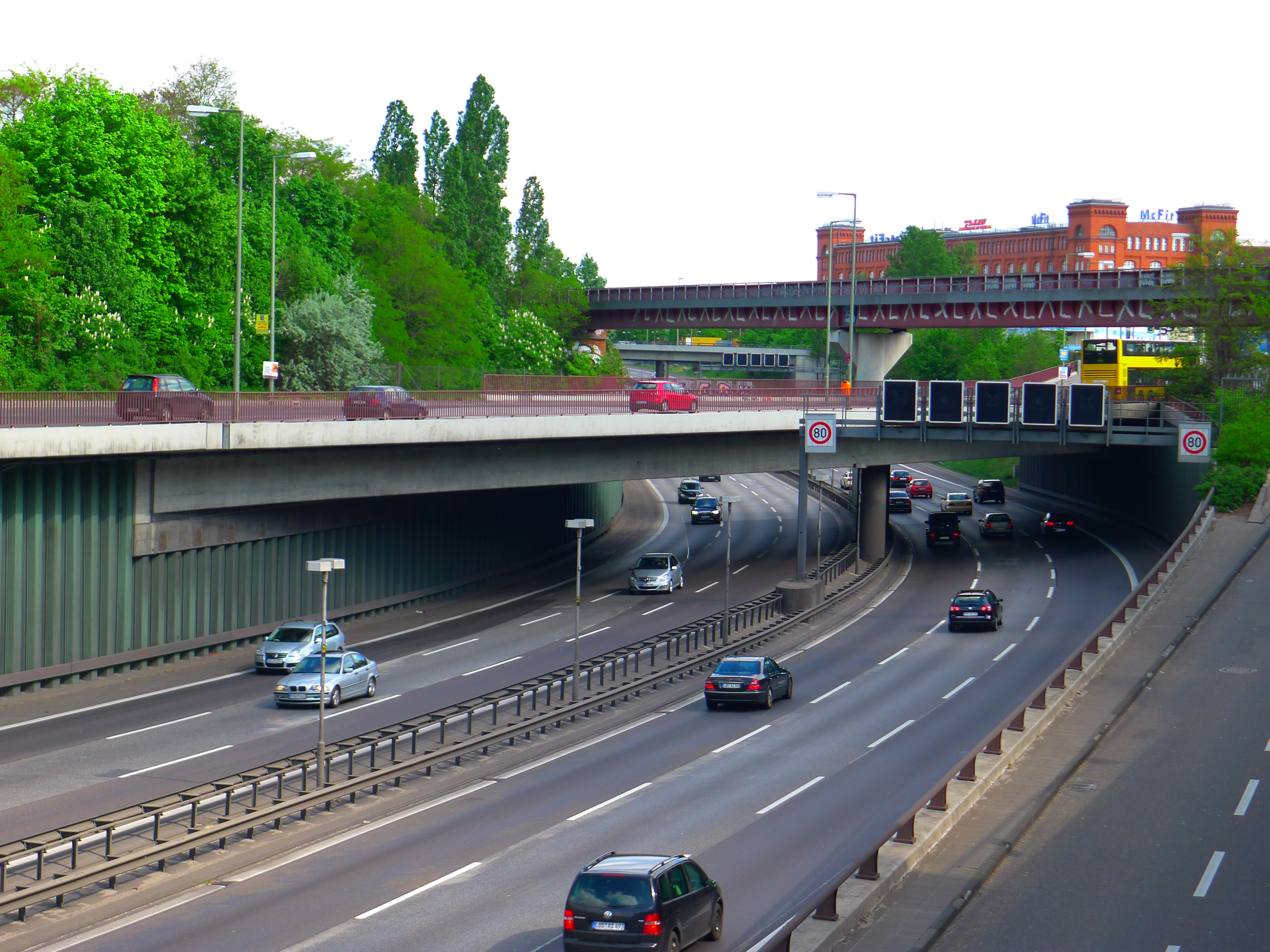 Brücke des Sachsendamms über die Stadtautobahn